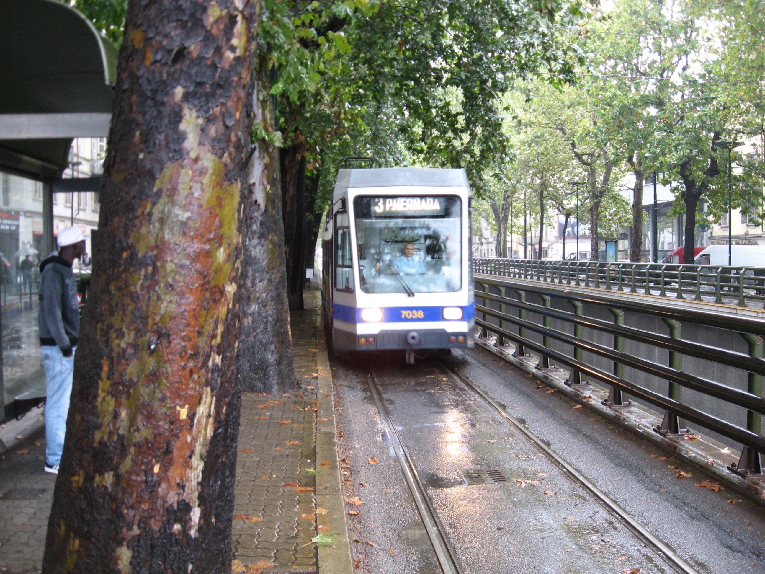 De tram in Turijn in 2009